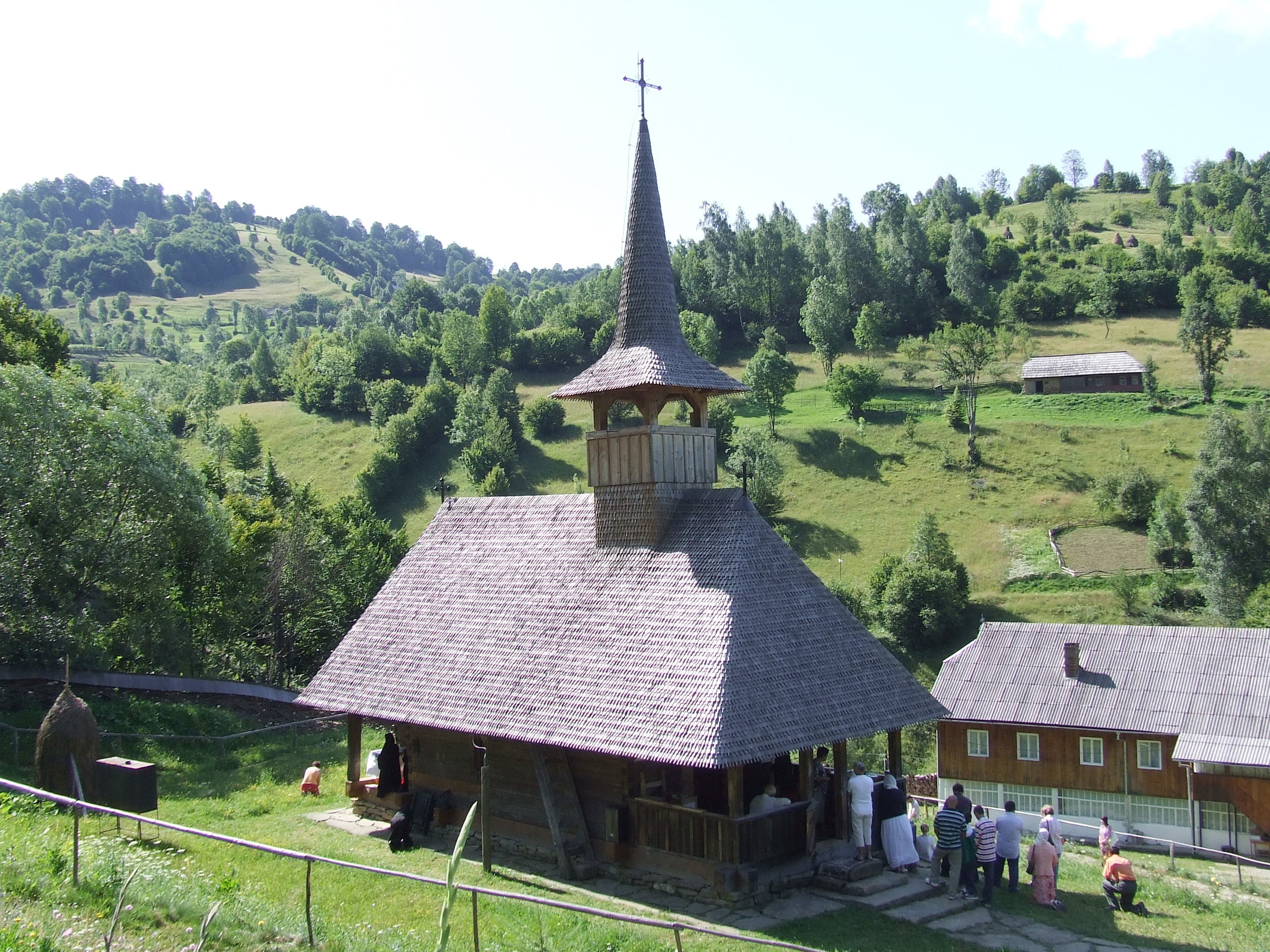 Biserica de lemn din Sângorz-Băi, județul Bistrița-Năsăud.